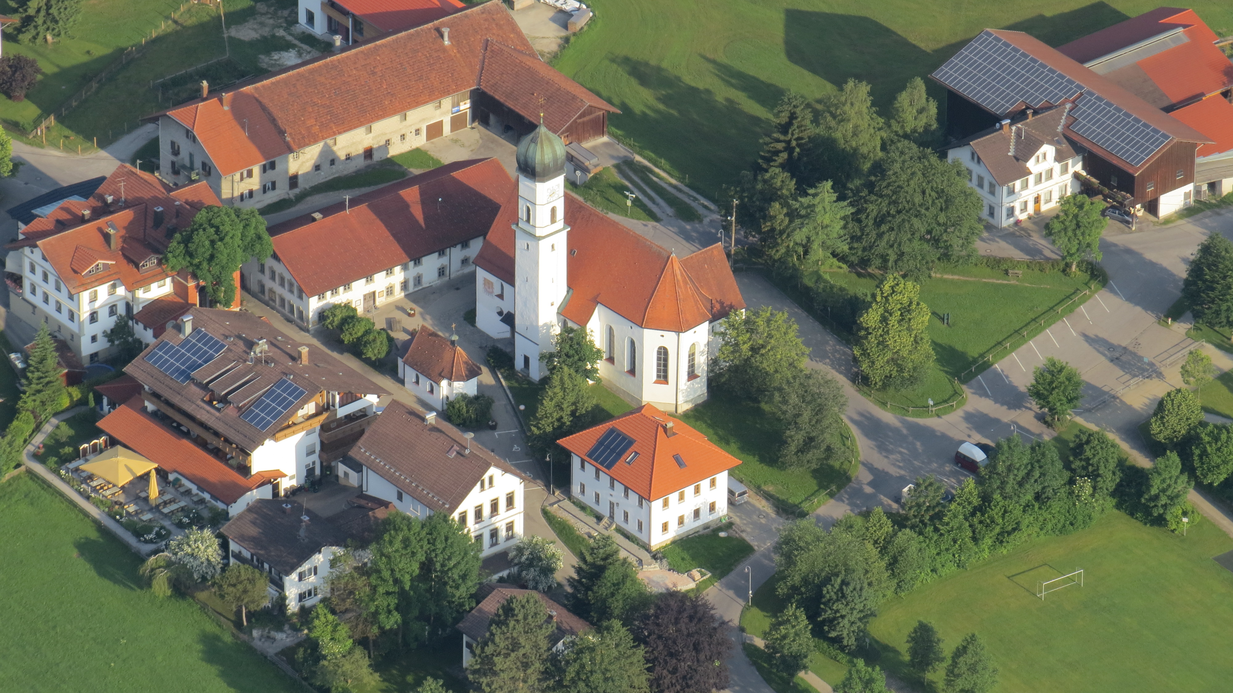 Speiden von oben, Eisenberg (Allgäu)